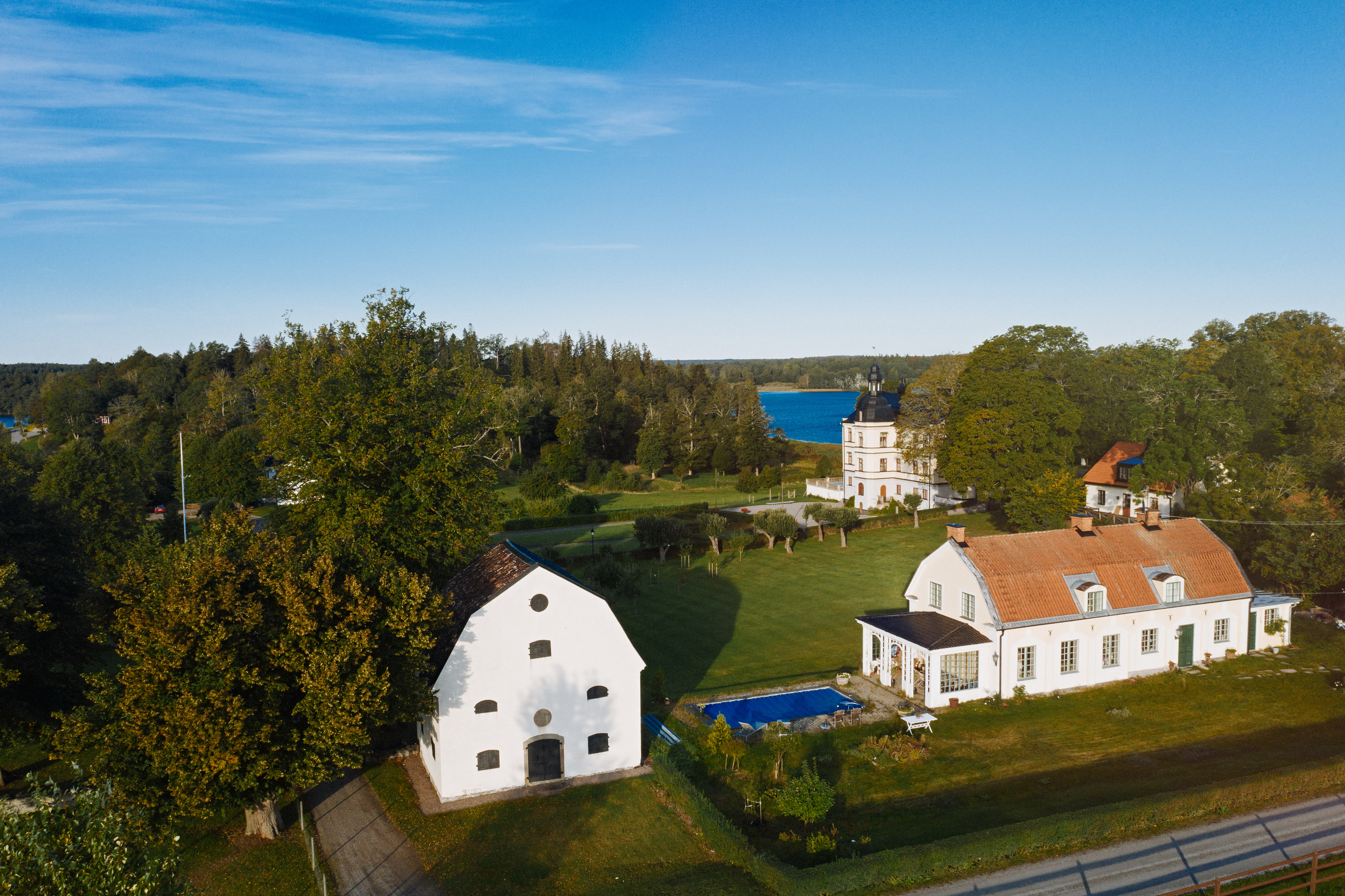 Spannmålsmagasinet, Torsåker Slott